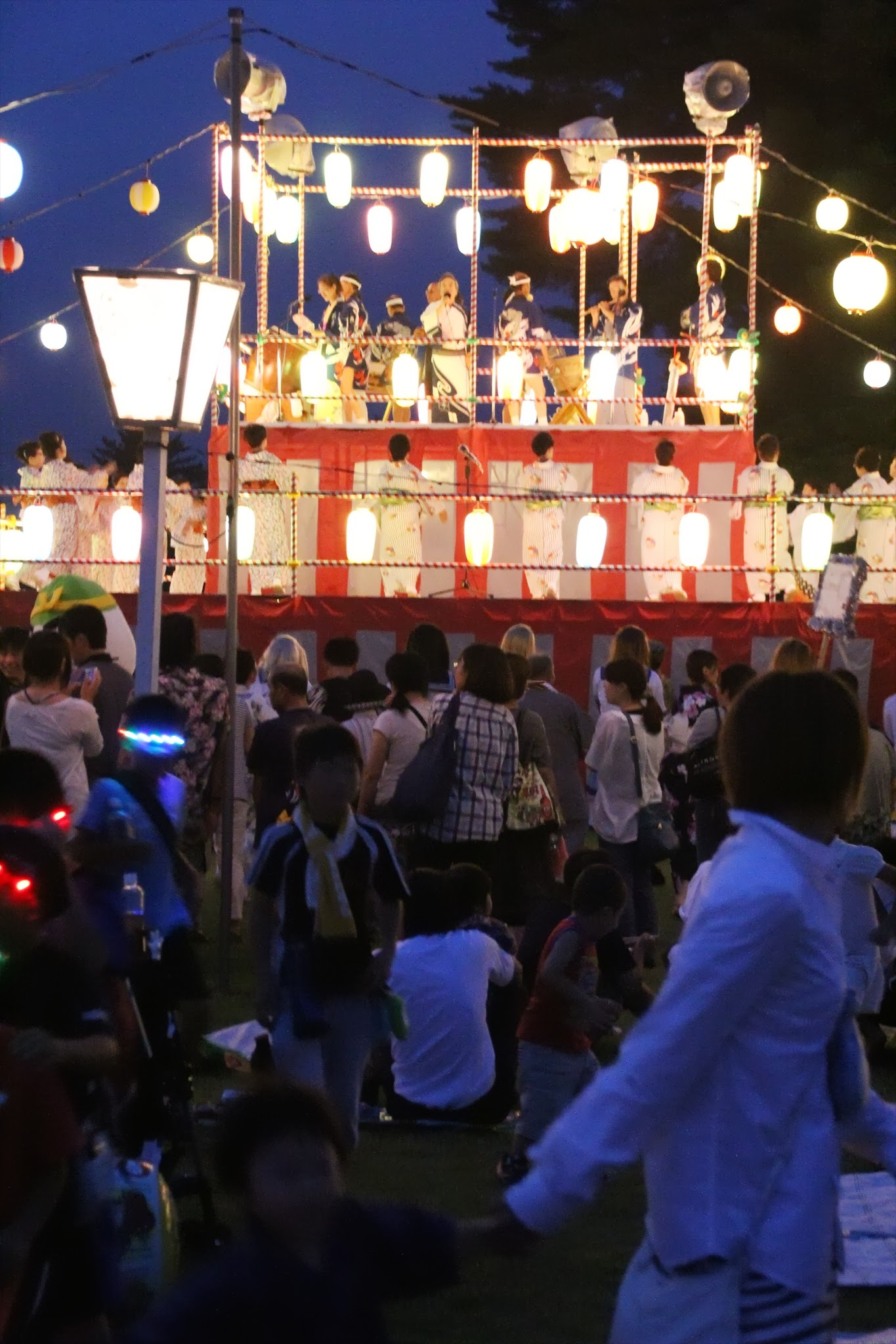 Title 25.7.23 古河・駐屯地納涼大会櫓の周りを多くの人が取り囲んだ.JPG Album Events and Public Relations (イベント・行事・広報活動等) 駐屯地納涼大会（古河）